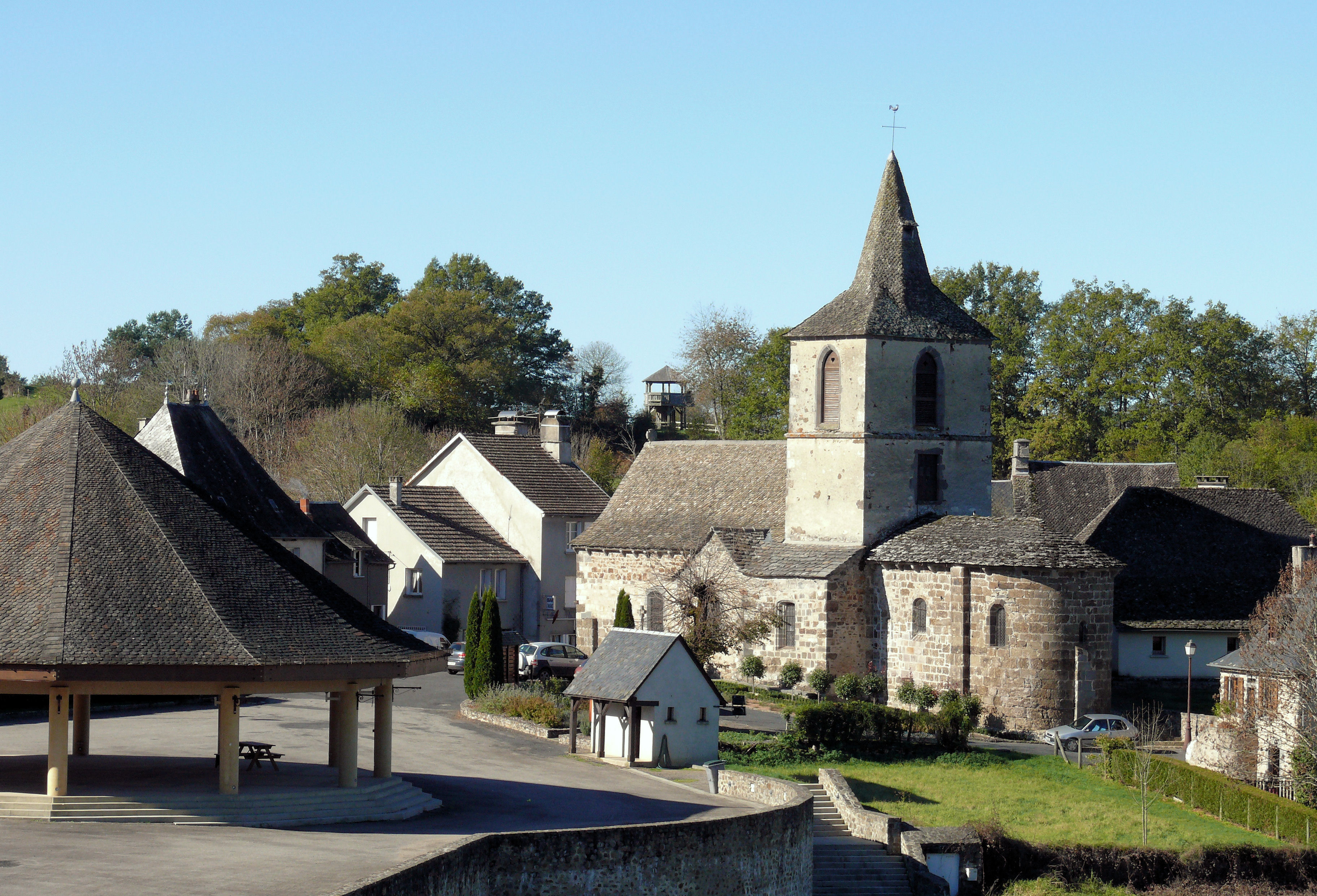 Chalvignac - Place de l'église